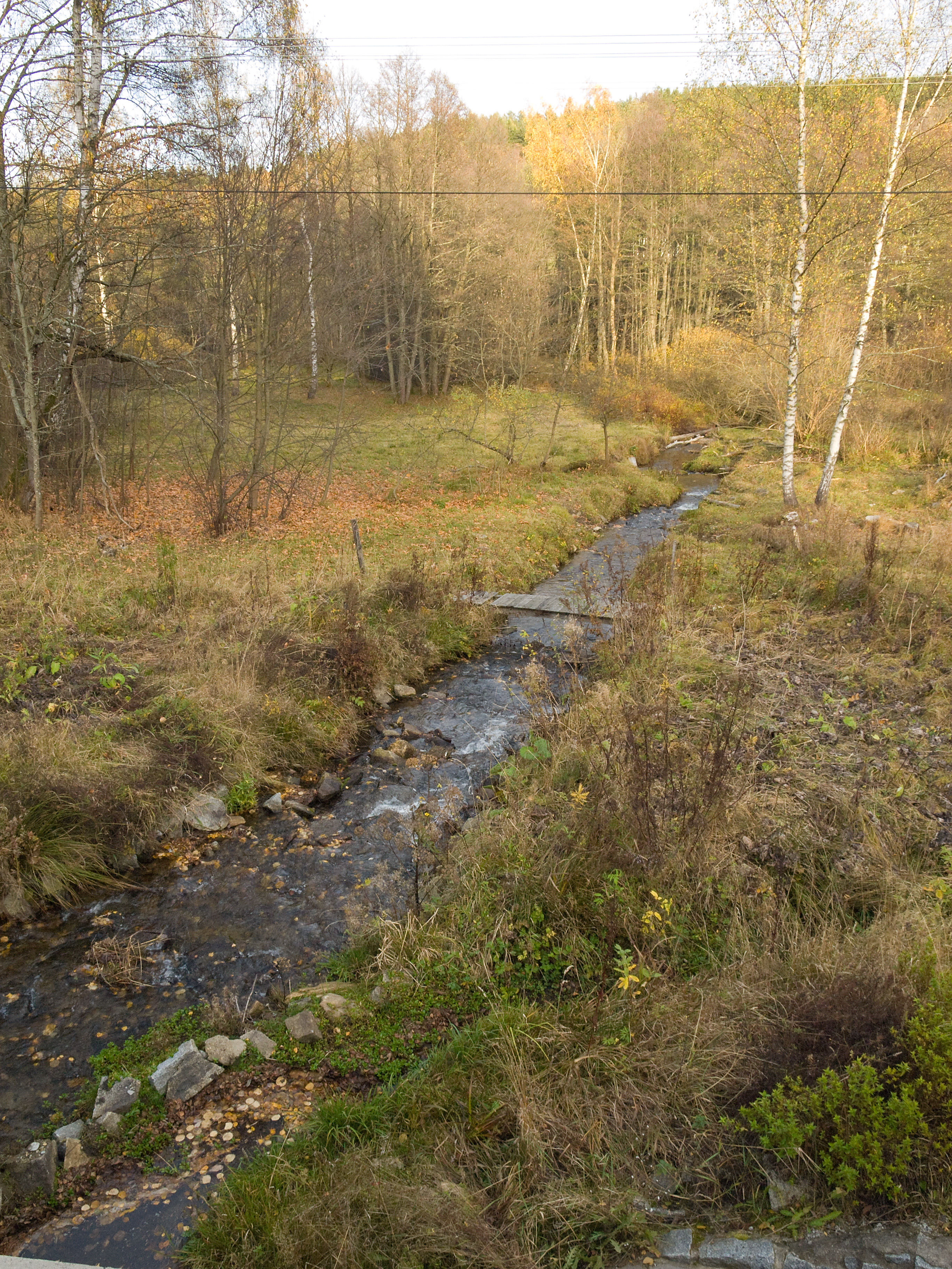 Potok Šukačka, KÚ Javorná na Šumavě